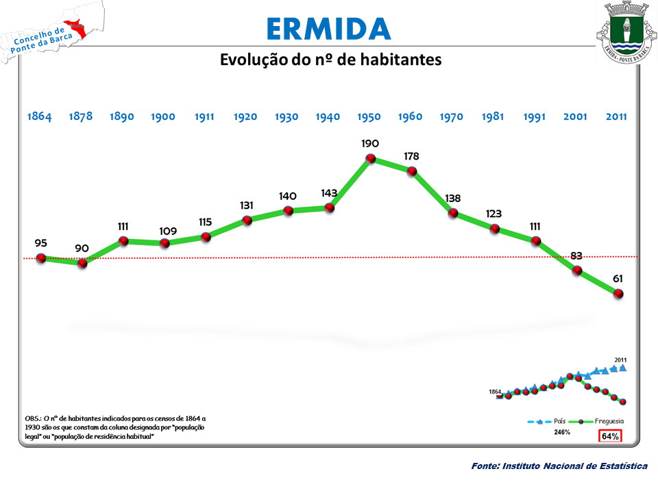 Censos 1864/2011